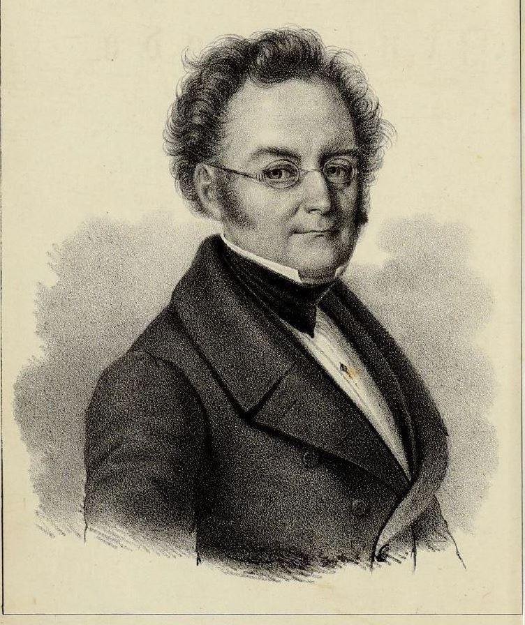 Bildnis des Arztes und Parlamentariers Johann Gottlieb Stemler.